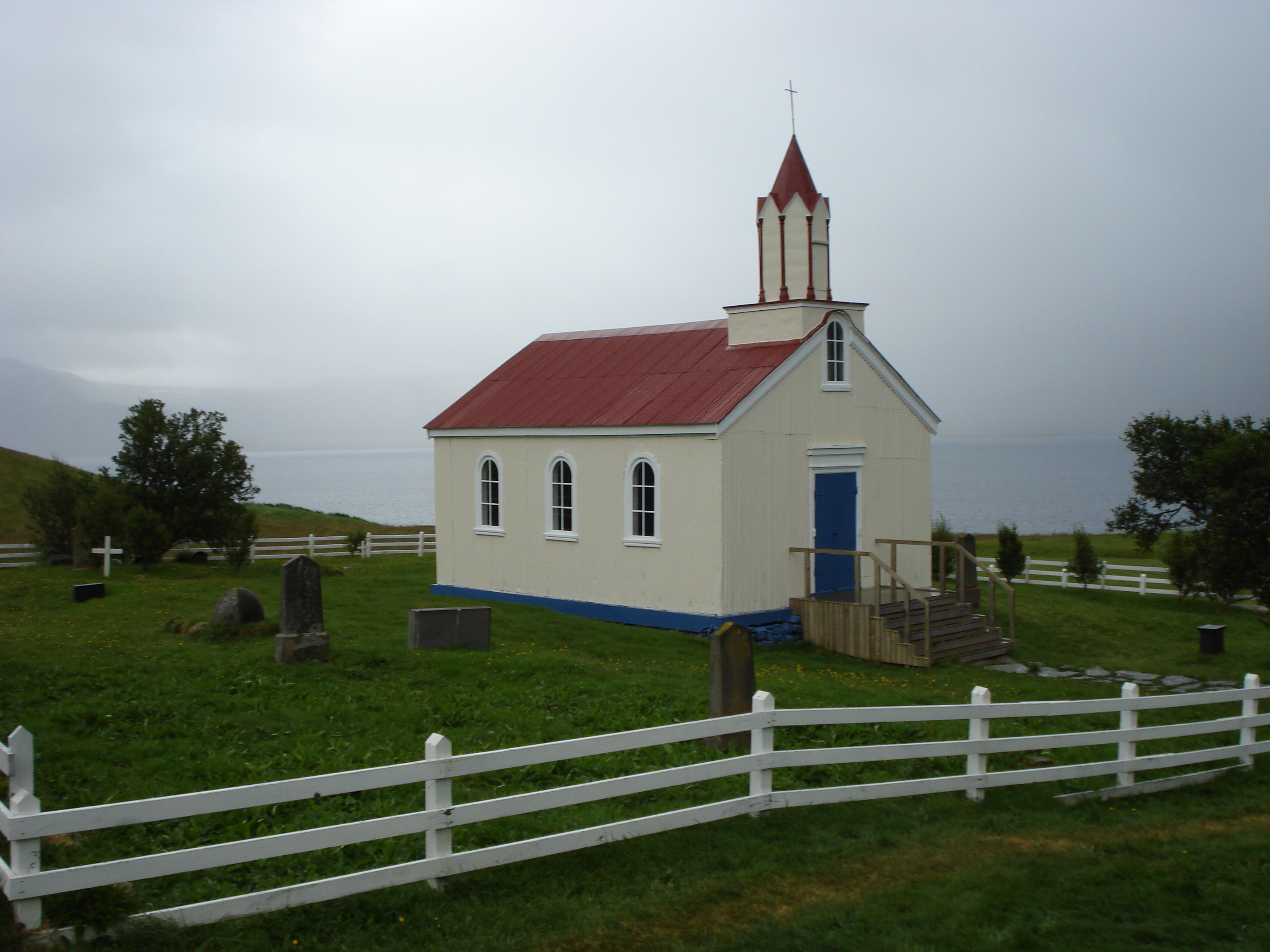 Hrafnseyri (Jón Sigurðsson), IcelandHrafnseyrarkirkja í Þingeyrarprestakalli